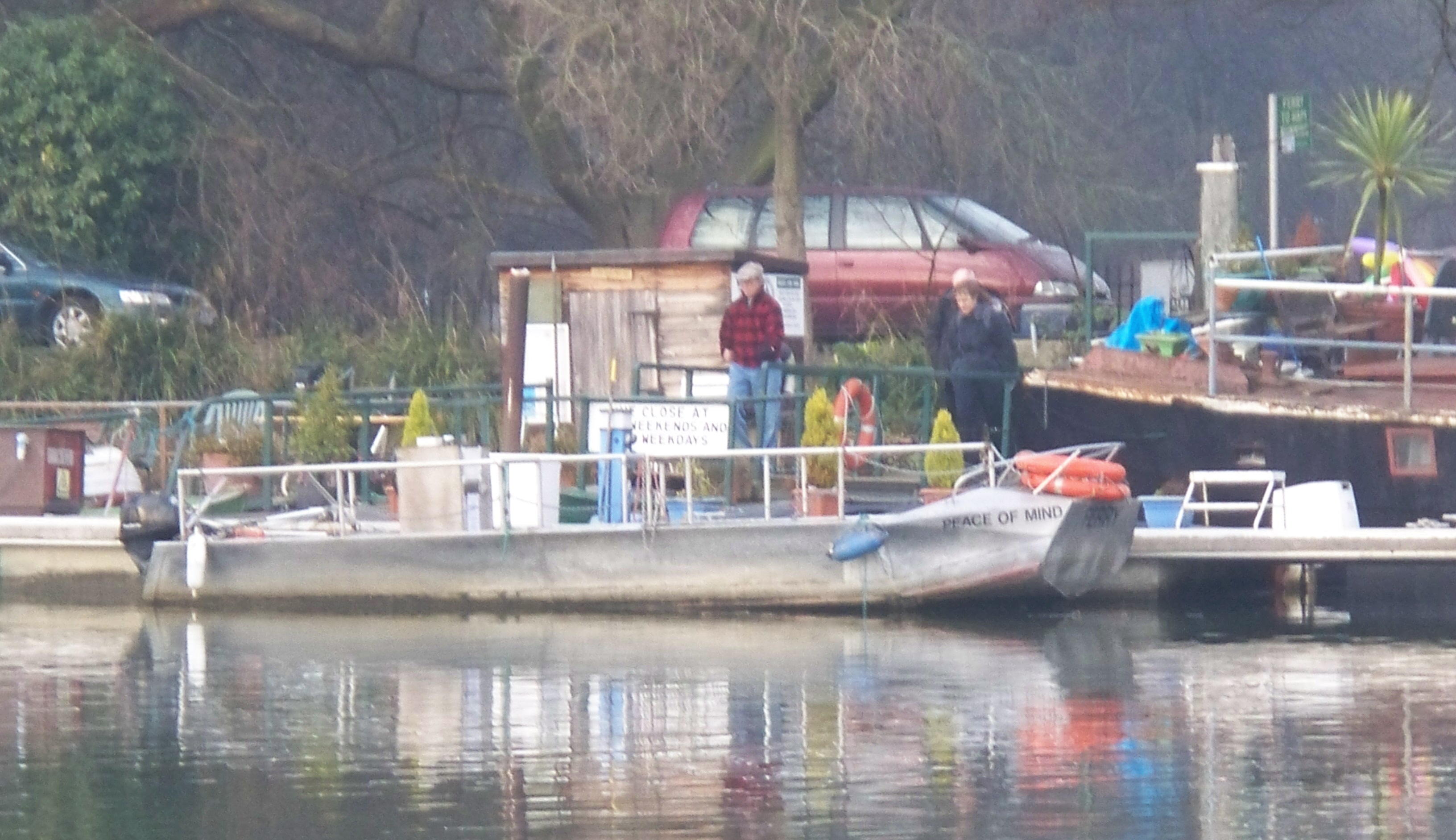 passengers boarding Hammerton's Ferry